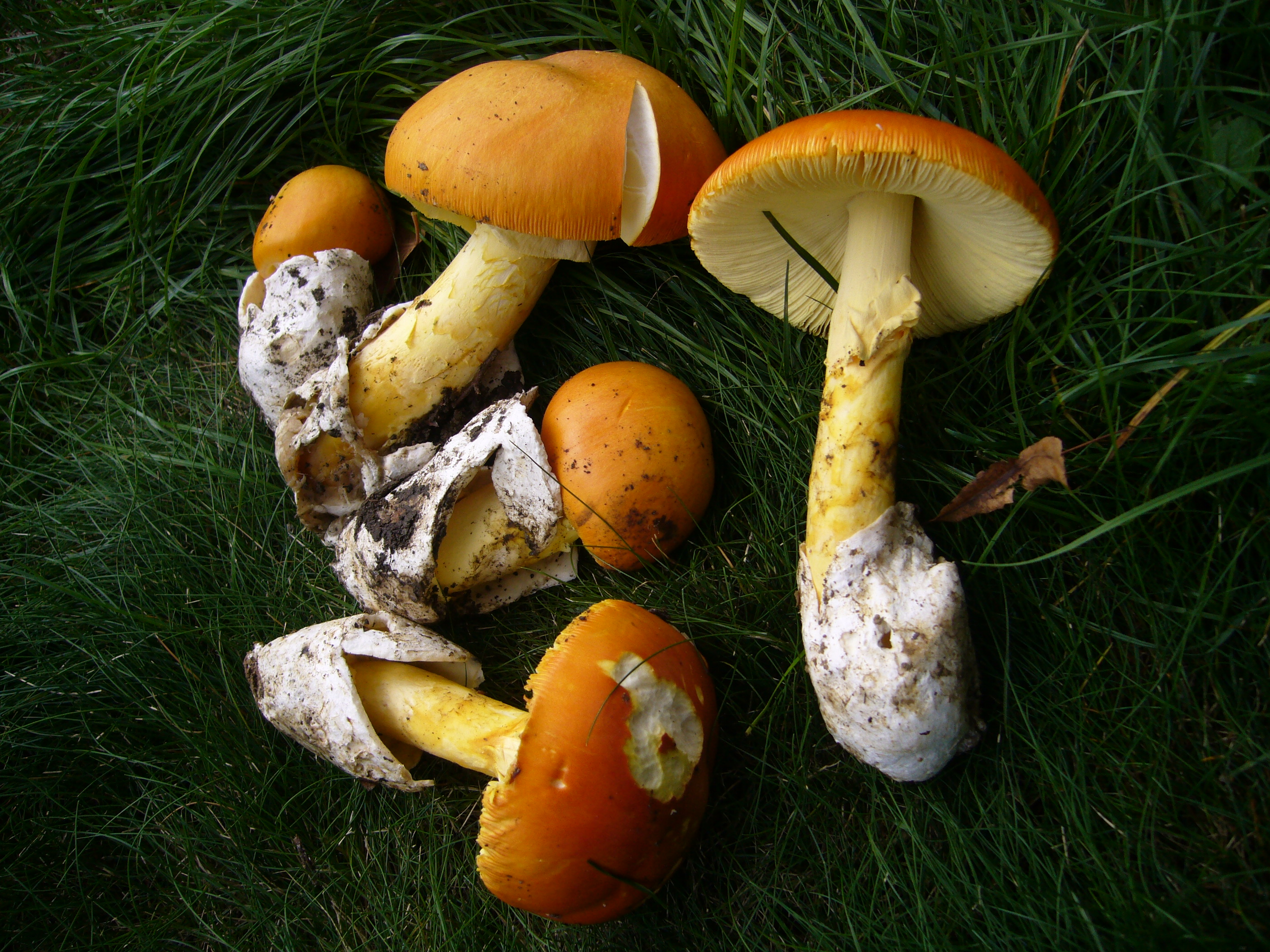 Oronges (Amanites des Césars) posées dans l'herbe